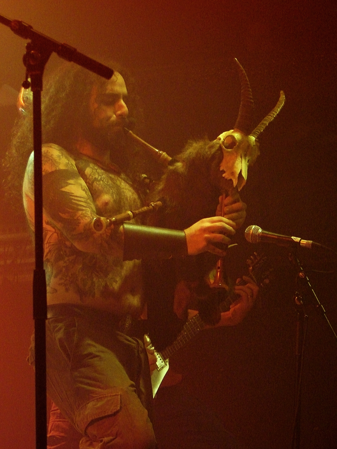 Eluveitie au Cernunnos Fest 07, le 16/12/07 à la Locomotive, Paris.